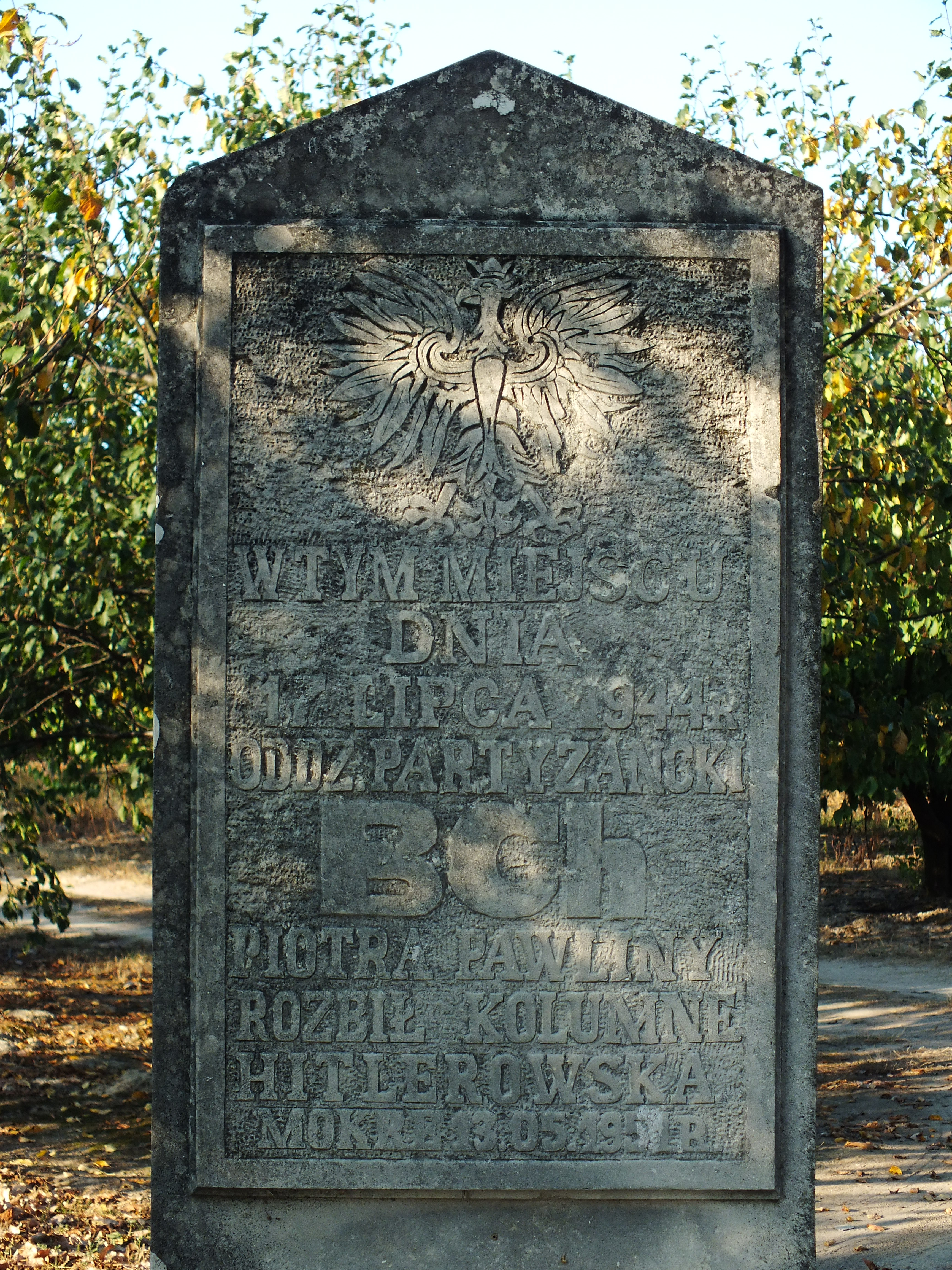 obelisk Mokre Bataliony Chłopskie Piotr Pawlina 17 lipca 1944